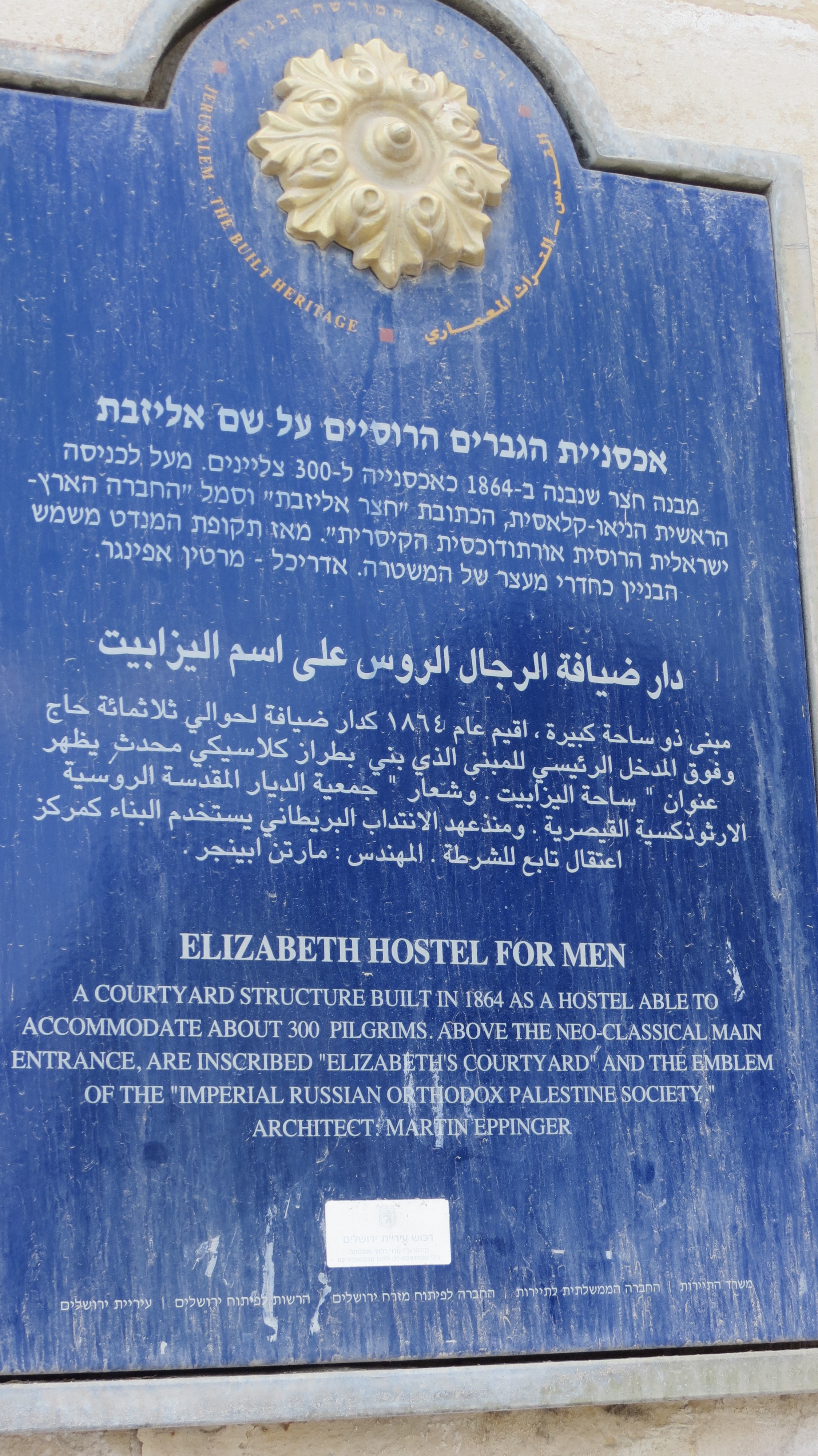 Russian Compound, Jerusalem, Israel מגרש הרוסים